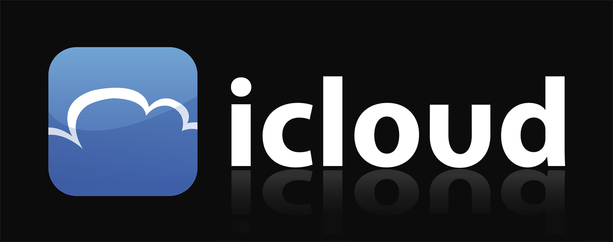 Icloud